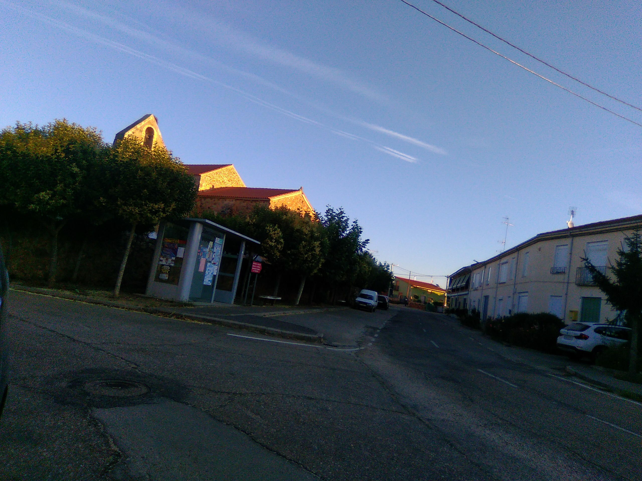 Bercianos de Vidriales, España